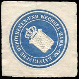 Sealing stamp Title: Bayerische Hypotheken - und Wechsel - Bank Description: blau, weiß, geprägt Place: München size: 4x4 cm